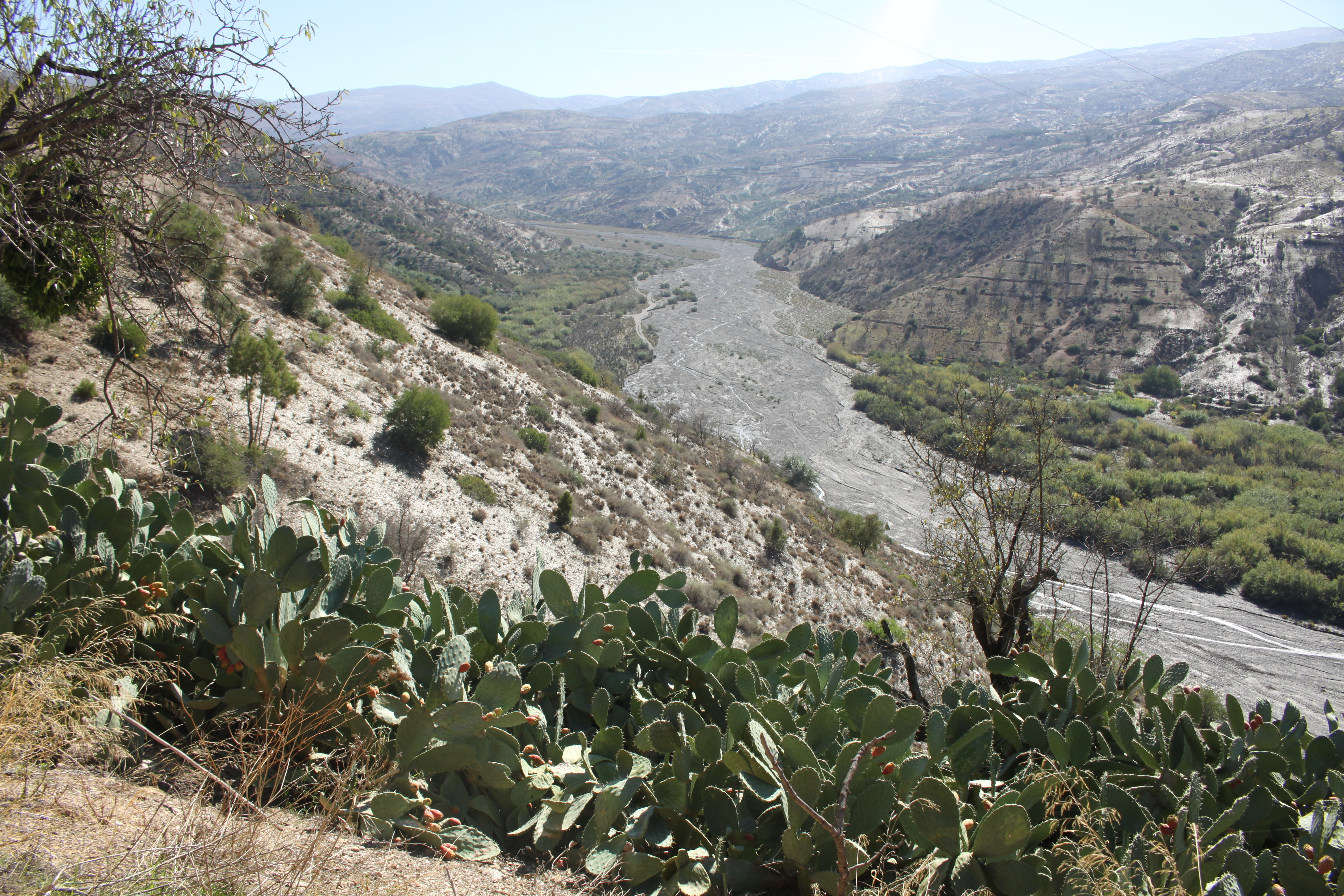 Bild wurde in der nähe von Al Hoceima erstellt.